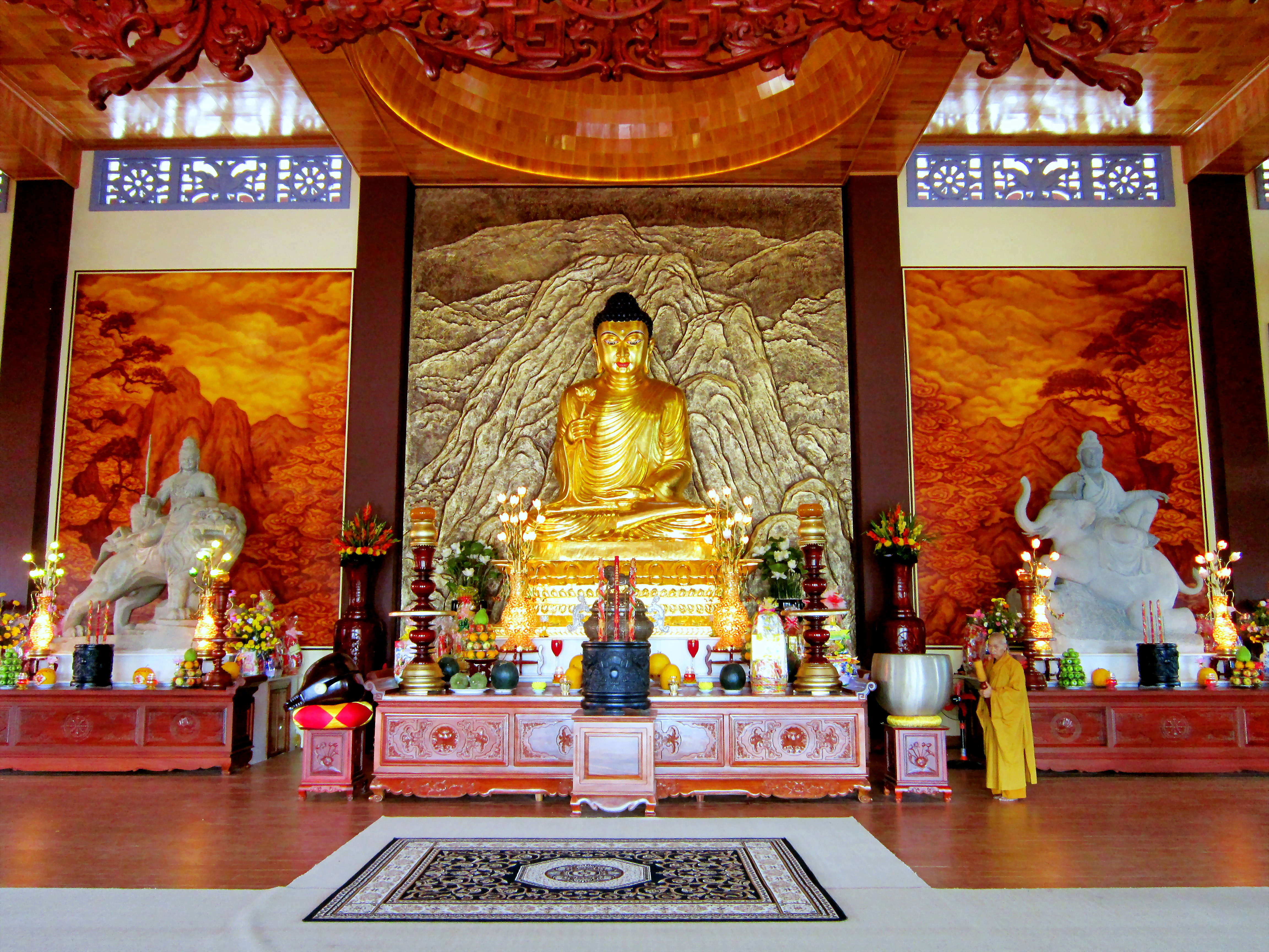 Bên trong chánh điện Thiền viện Trúc Lâm Chánh Giác ở xã Thạnh Tân huyện Tân Phước, tỉnh Tiền Giang,Việt Nam.